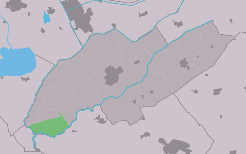 Kaartsje fan himrik fan Spanga